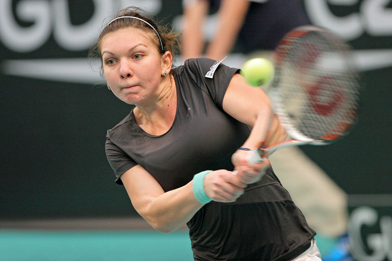 Simona Halep (ROU), Qualifications 2e tour, Open Gaz de France Suez, Stade Pierre de Coubertin, Paris, dimanche 8 février 2009.